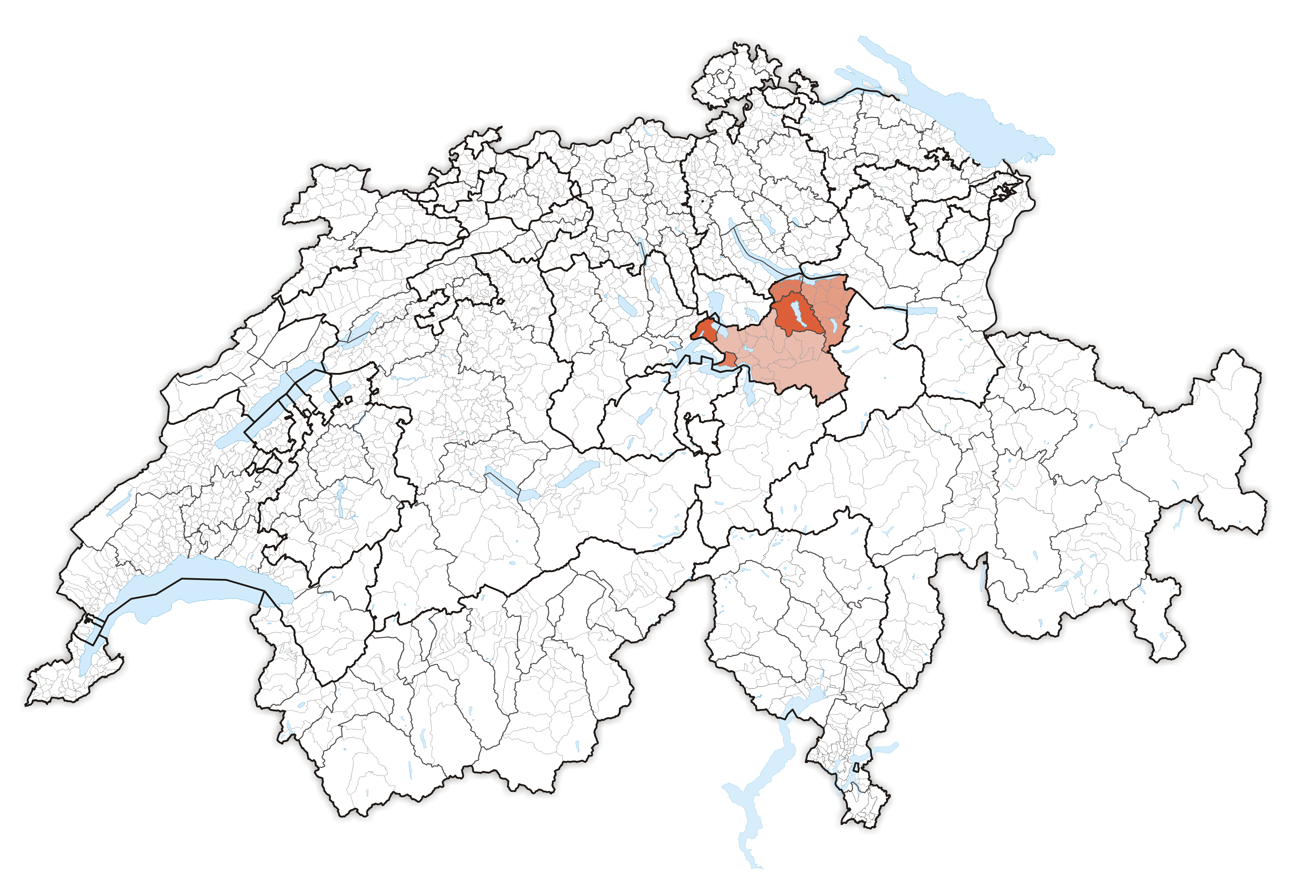 Canton Schwyz